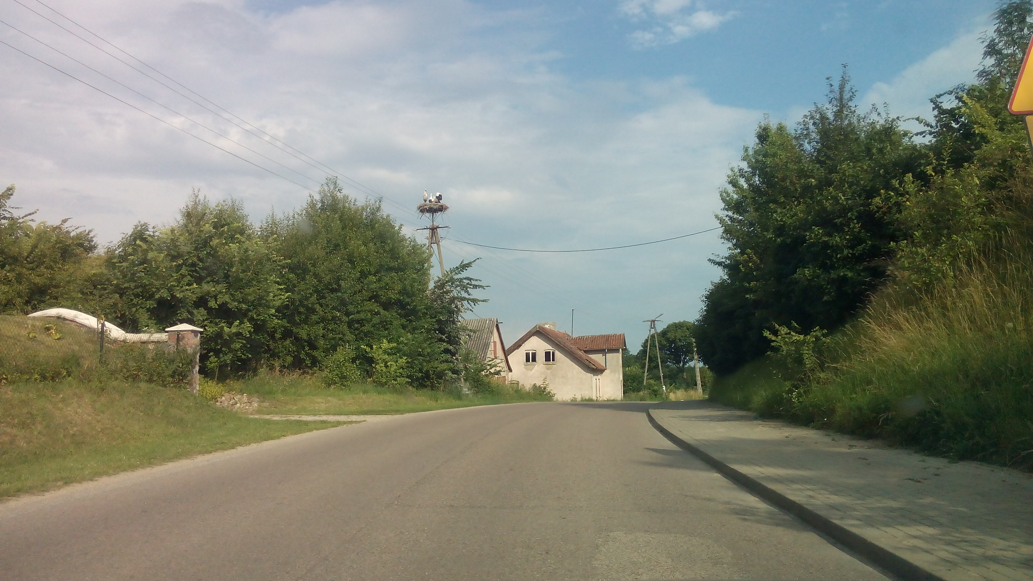 Gniazdo bociana białego znajdujące się we wsi Grabnik